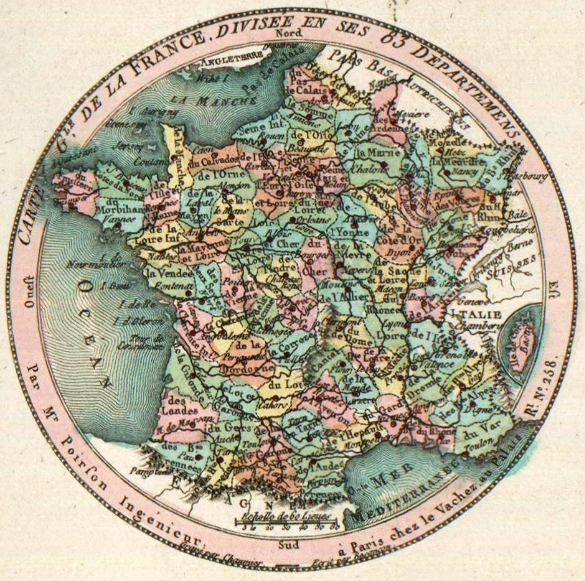 Jean-Baptiste Poirson, Atlas national des 83 départements français, 1792 ː carte générale.